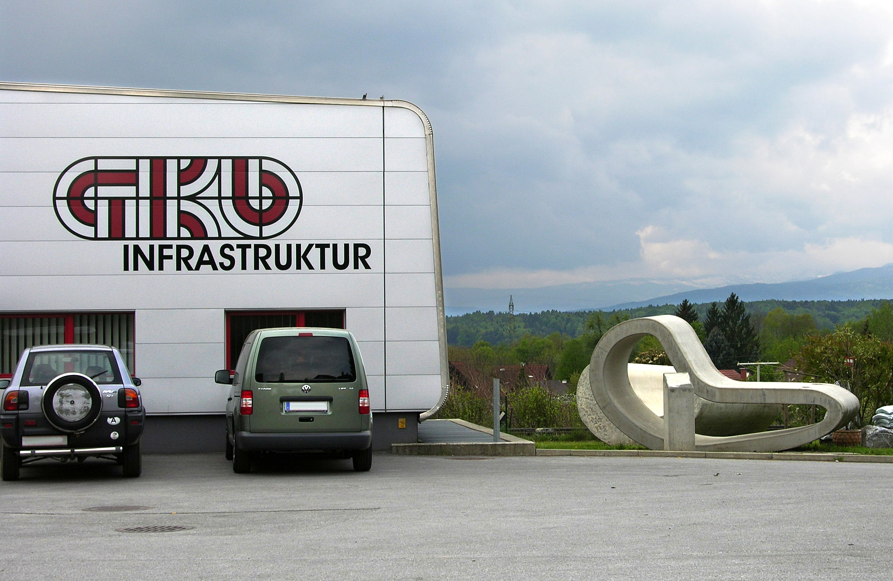 GKB Infrastruktur Werkstätte in Lieboch mit Wakolbinger Skulptur am 1. Mai 2008